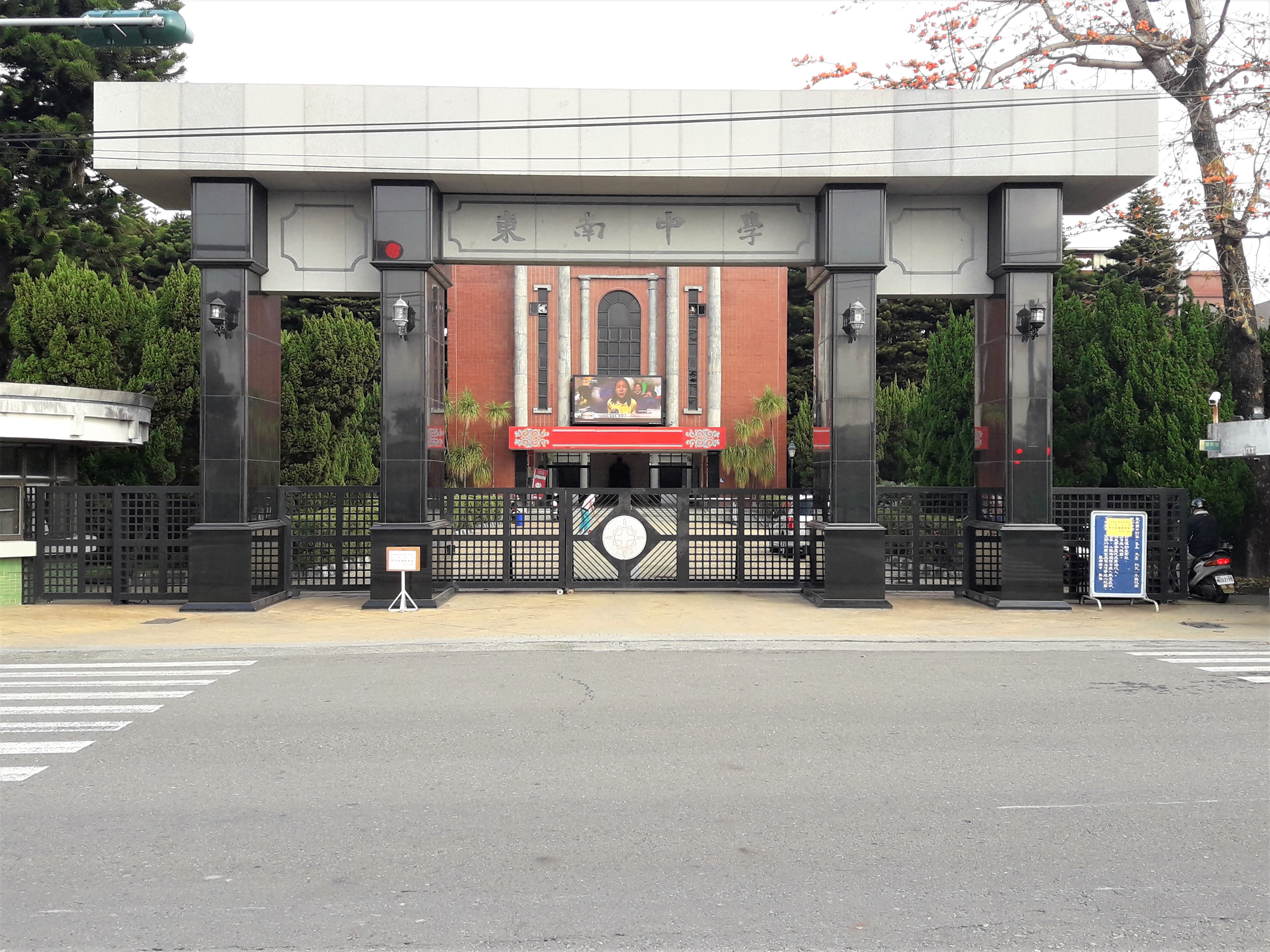 雲林縣立東南國民中學大門。